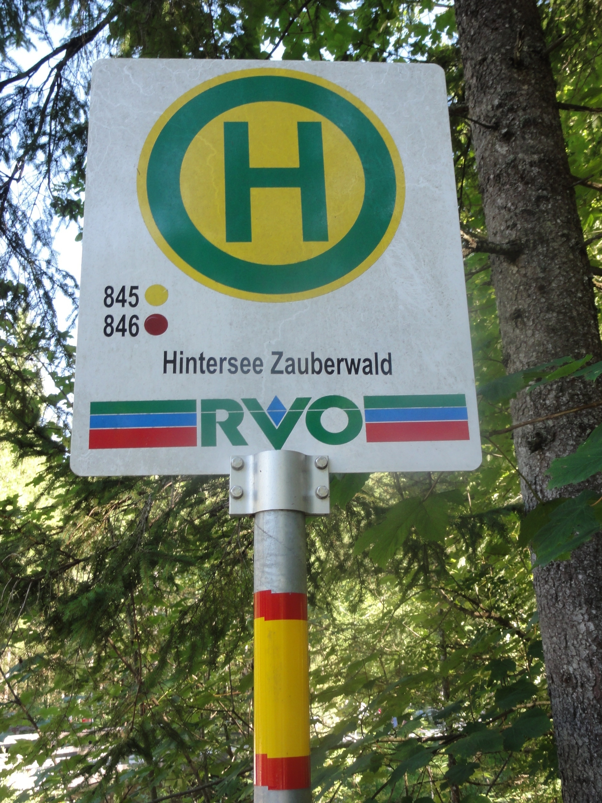 Germany, Hintersee (Ramsau), Zauberwald, Lkr. Berchtesgadener Land, Oberbayern